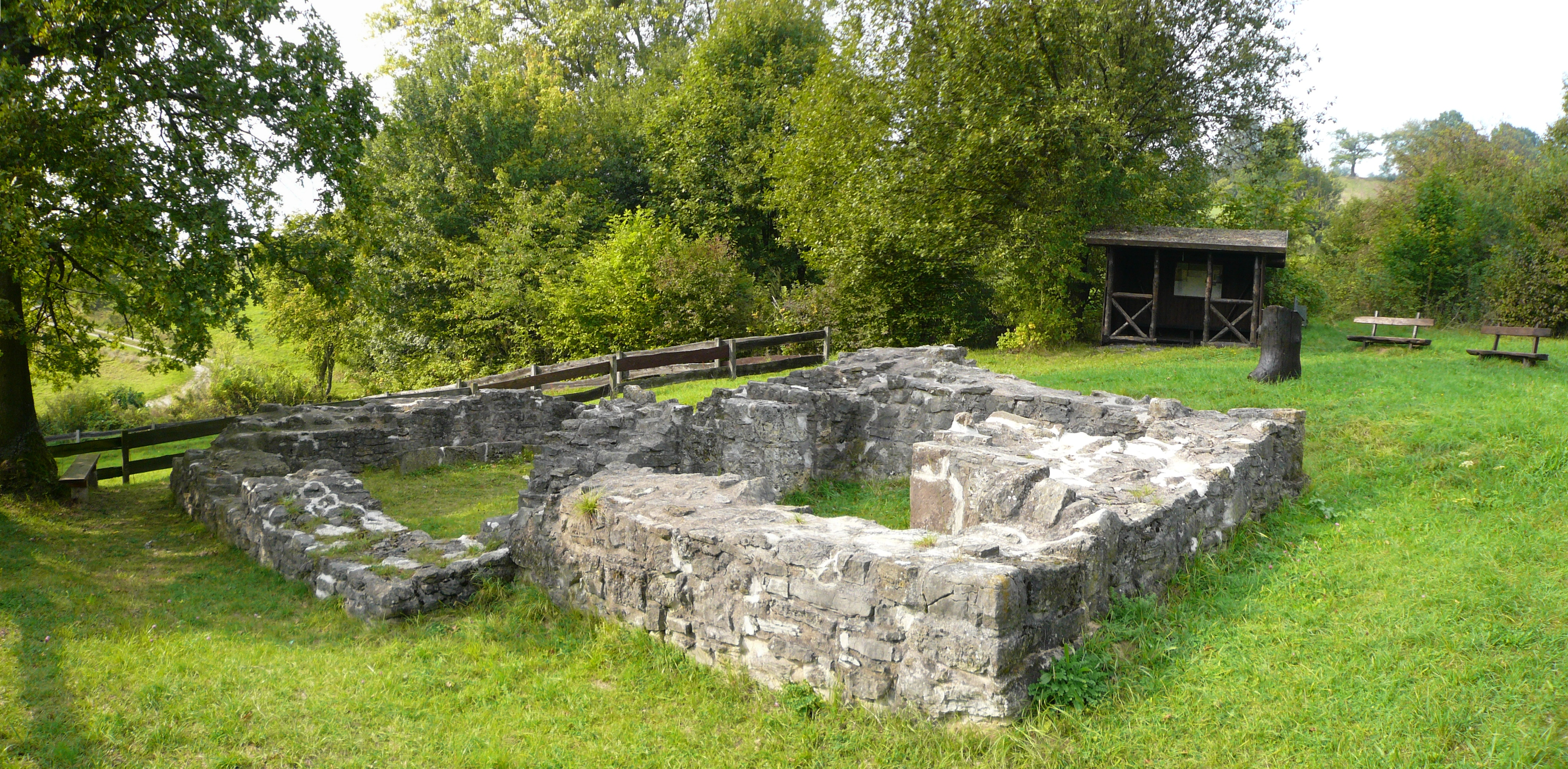 Mauerwerksreste der Kirche der Wüstung Wetenborn östlich von Scheden, Niedersachsen. Anscheinend vorromanischer Bau von 10,80 m × 7,00 m, freigelegt 1975/77